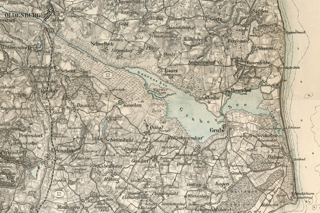 Karte aus dem Jahre 1893: Gruber See, Oldenburger Graben, oben links Oldenburg in Holstein